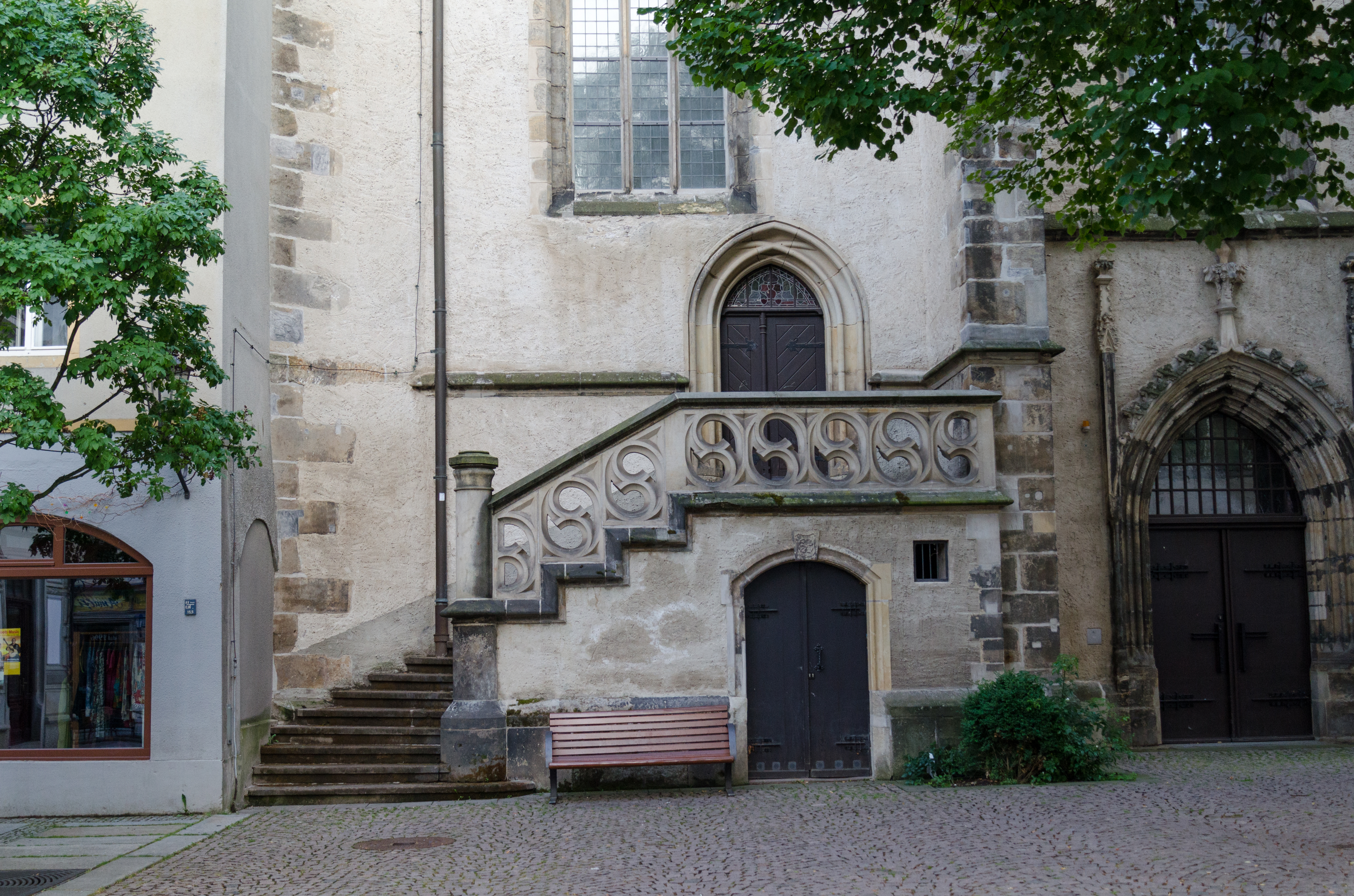 Meißen, Heinrichsplatz 3